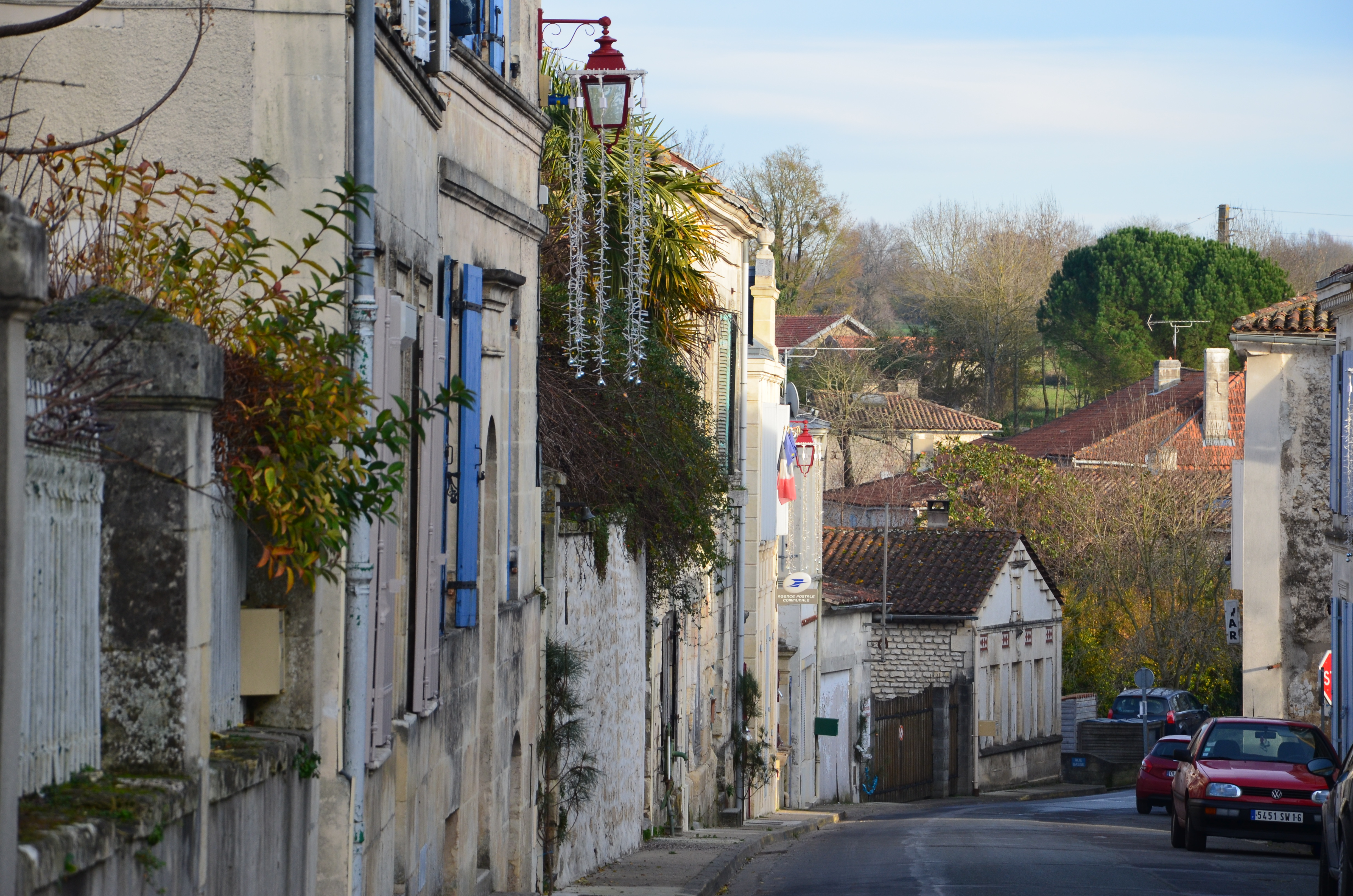 rue du Tarnac